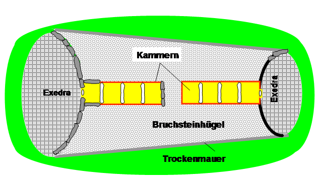 Audleystown